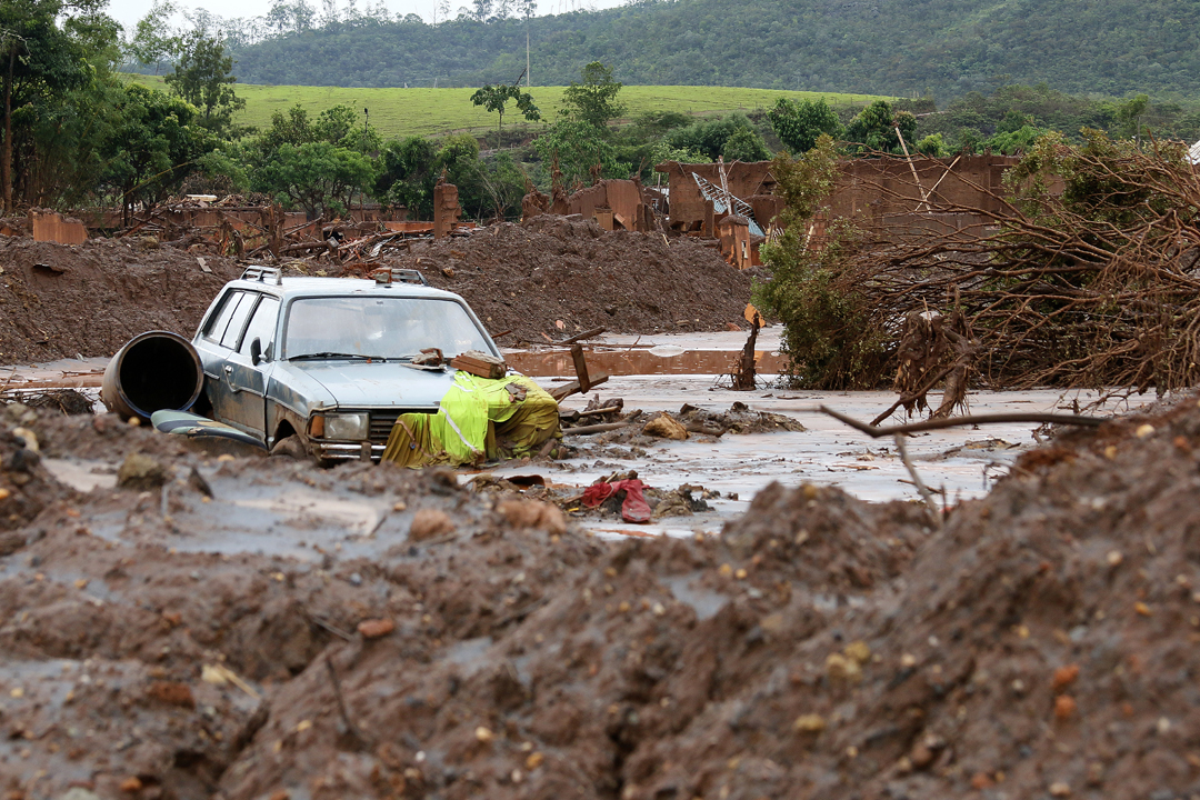 O rompimento da barragem de rejeitos da mineradora Samarco, cujos donos são a Vale a anglo-australiana BHP, causou uma enxurrada de lama que inundou várias casas no distrito de Bento Rodrigues, em Mariana, na Região Central de Minas Gerais. Inicialmente, a mineradora havia afirmado que duas barragens haviam se rompido, de Fundão e Santarém. No dia 16 de novembro, a Samarco confirmou que apenas a barragem de Fundão se rompeu. Local: Distrito de Bento Rodrigues, Município de Mariana, Minas Gerais. Foto: Rogério Alves/TV Senado